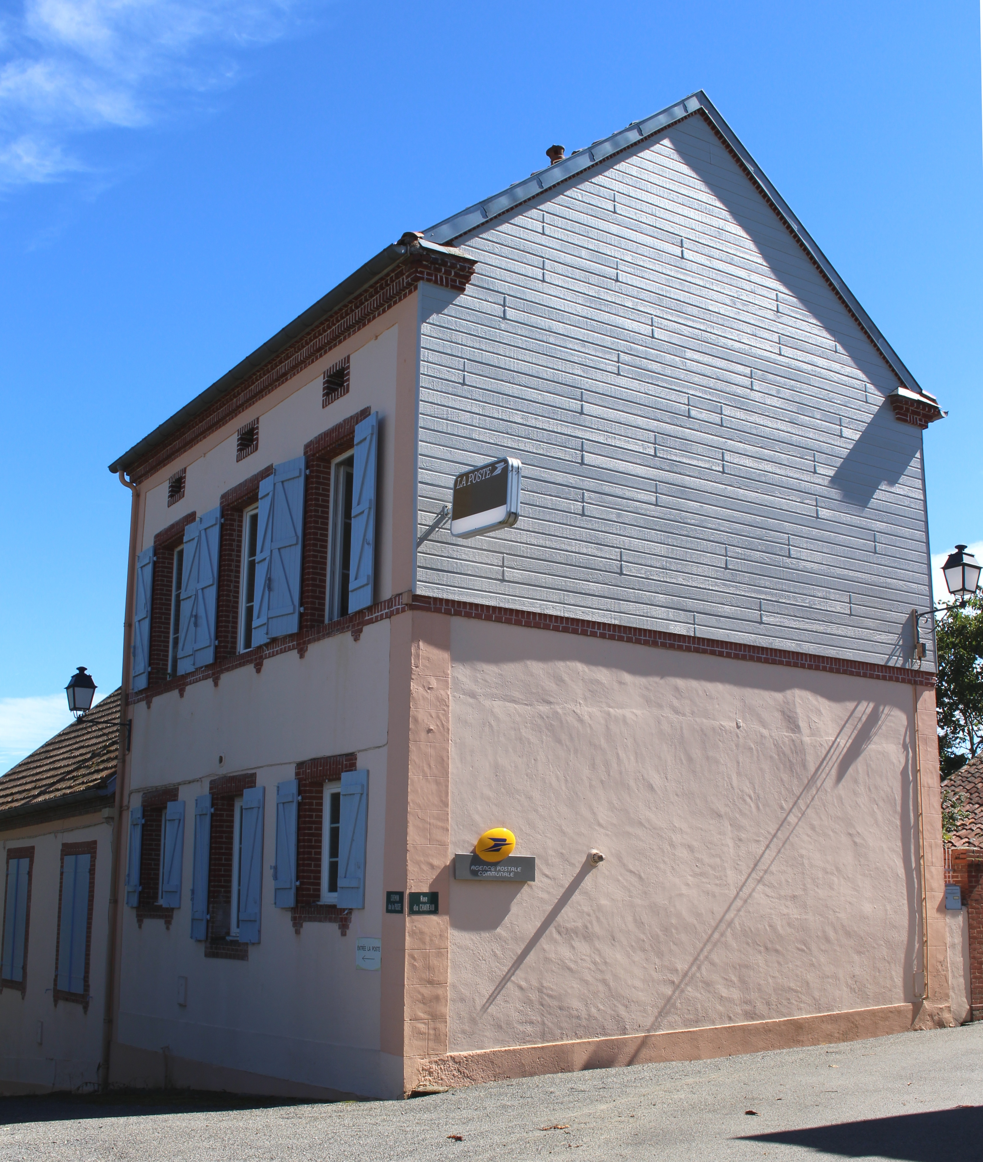 Poste de Lafitole (Hautes-Pyrénées)